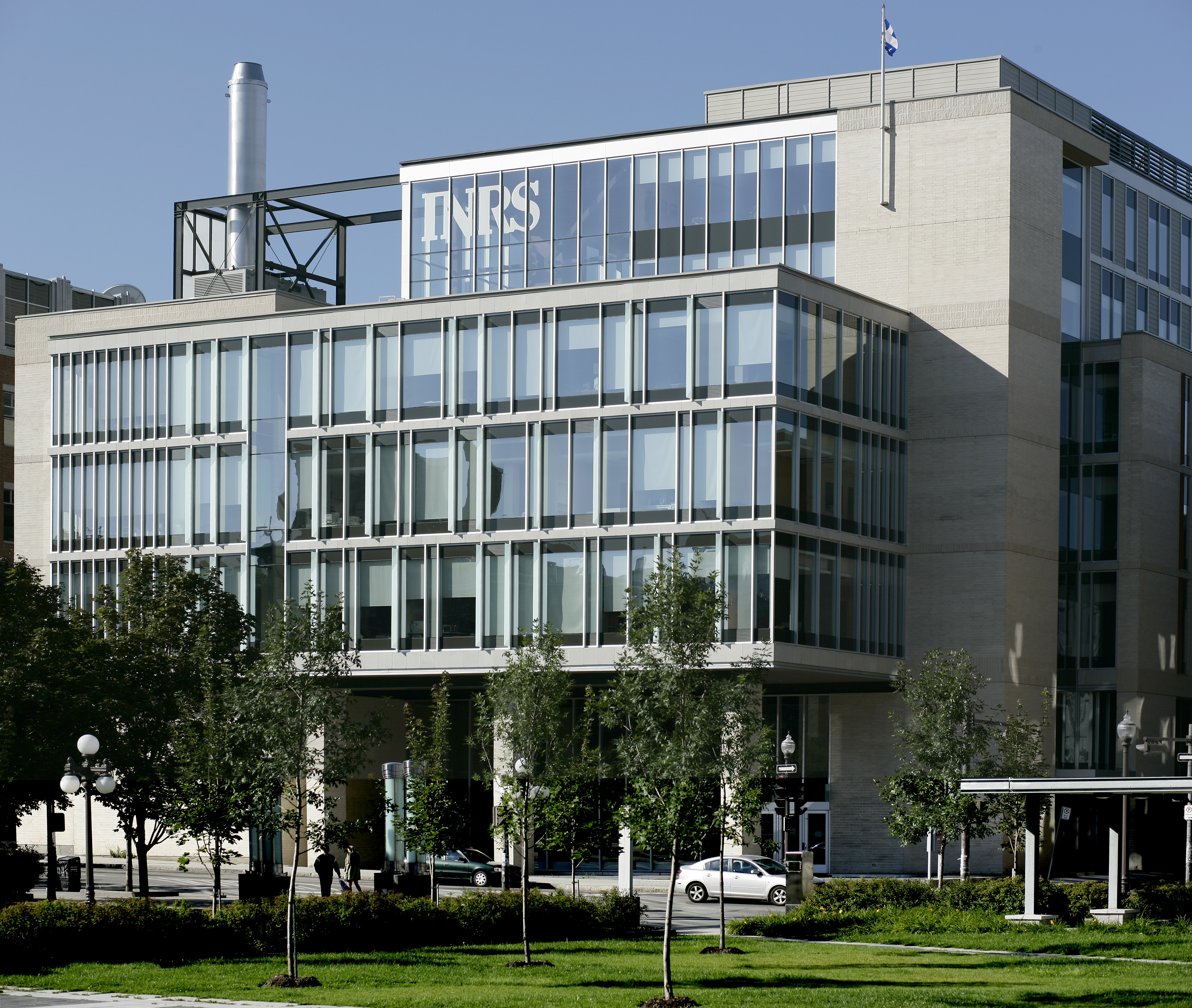 Photo de l'édifice de l'Institut national de la recherche scientifique (INRS) situé au 490, rue de la Couronne, Québec (Québec) G1K 9A9 CANADA. L'édifice abrite le siège social de l'INRS ainsi que le Centre Eau Terre Environnement.